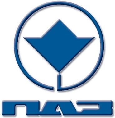 Логотип Павловского автозавода